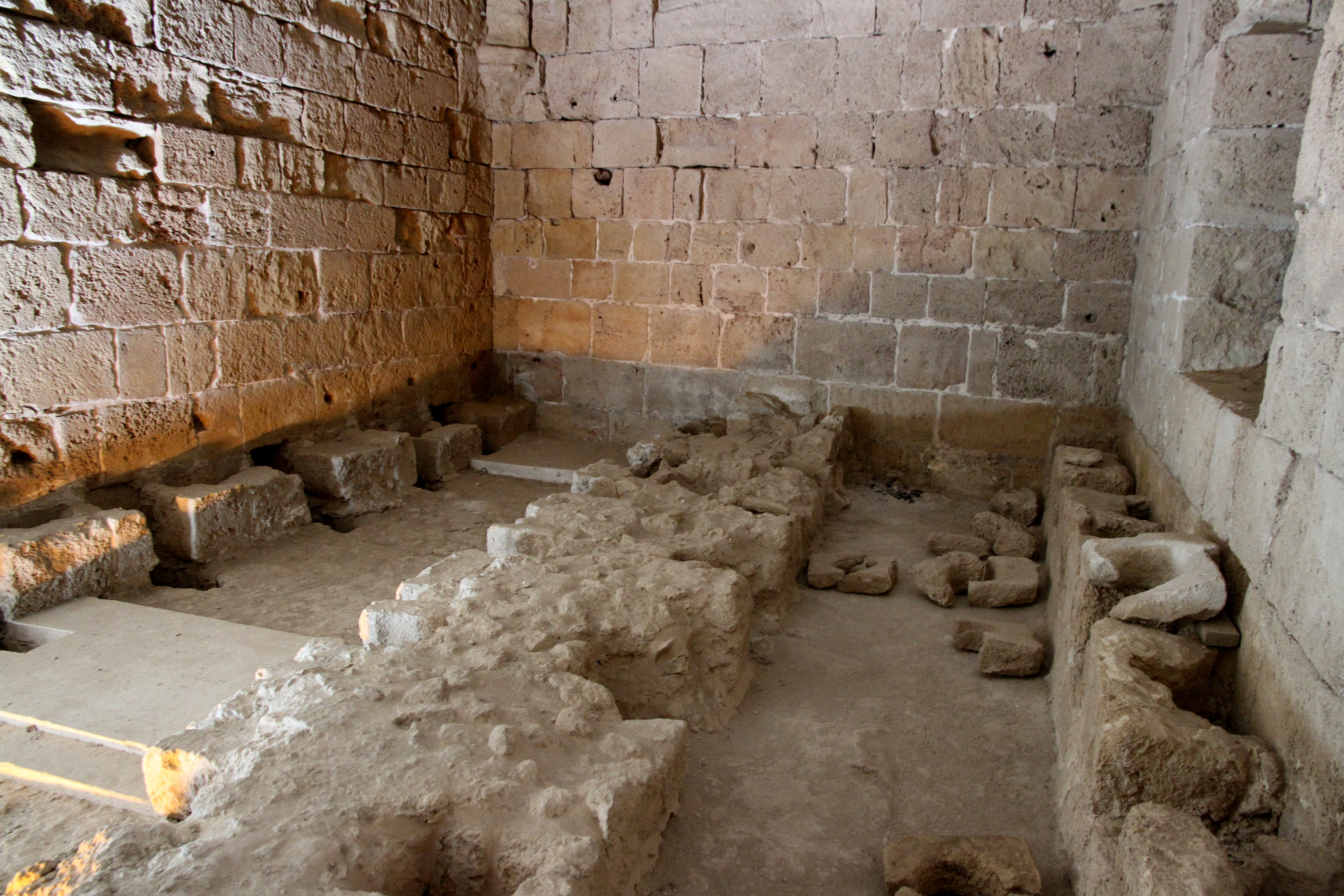 Acre (Akko) - Israel Acre